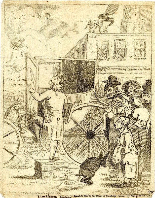 Peregrine Pindar Gent [Pseudonym]: Ode to the Hero of Finsbury Square. Congratulatory on His Late Mariage, and Illustrative of His Genius as His Own Biographer: With Notes Referential. London : I. Herbert, 1795. Motto auf der Kutsche: Small profits do great things. siehe auch